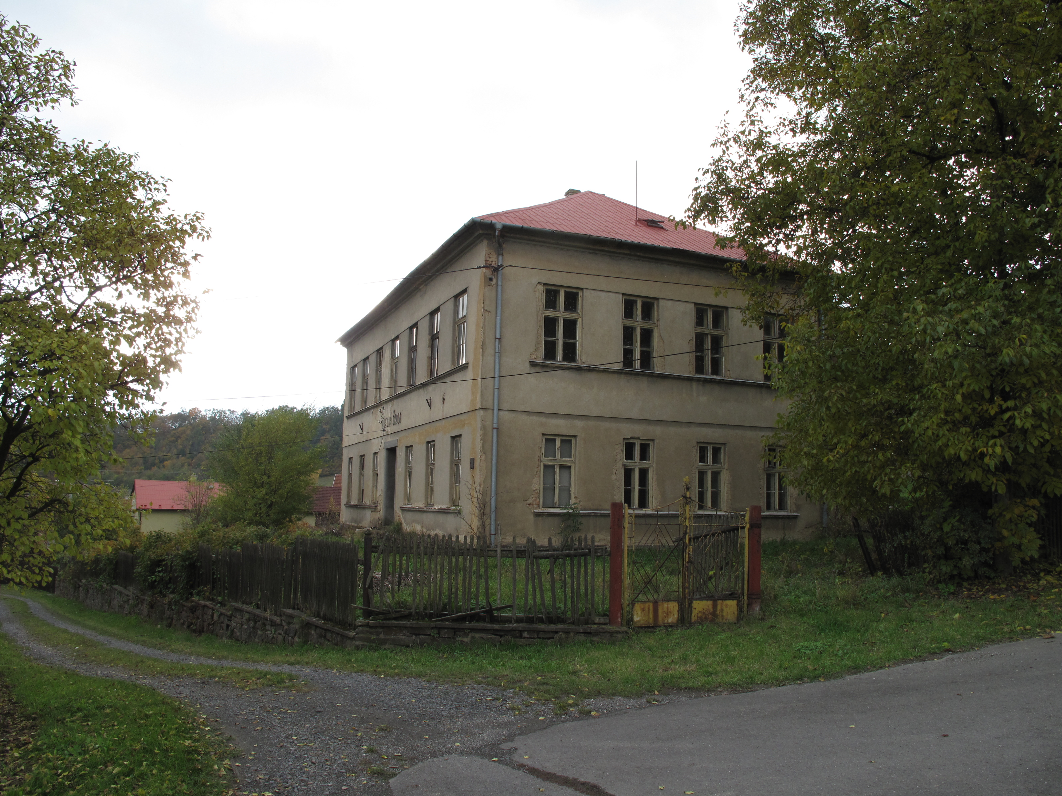 Lukavec (Fulnek). Okres Nový Jičín, Česká republika.